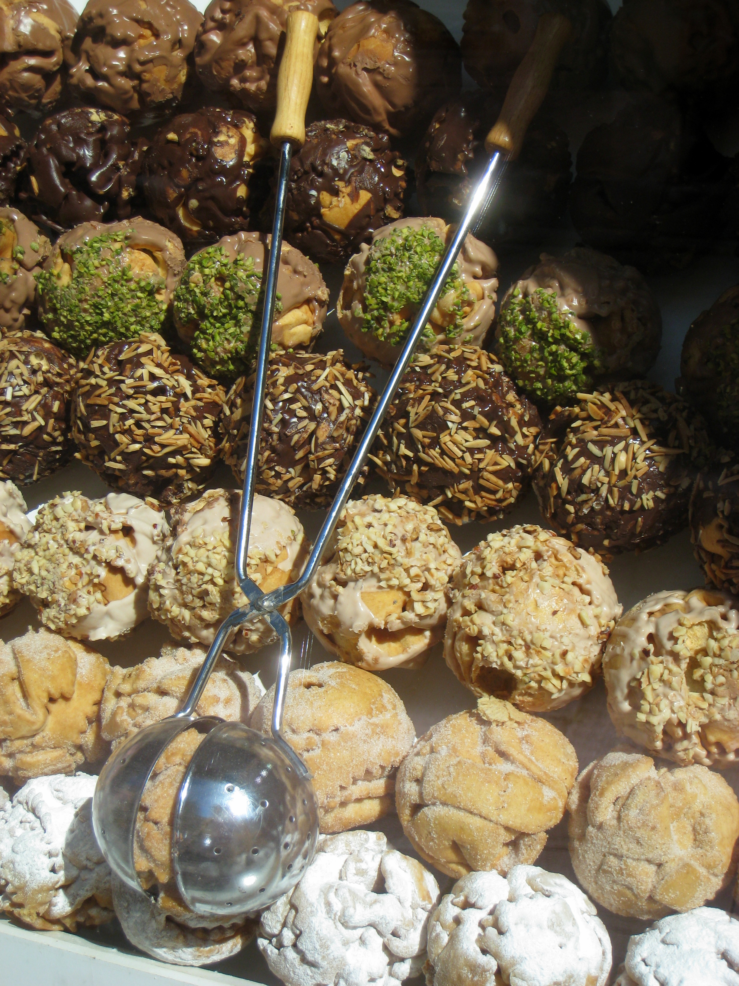 Schneebälle display, Rothenburg ob der Tauber, Germany.